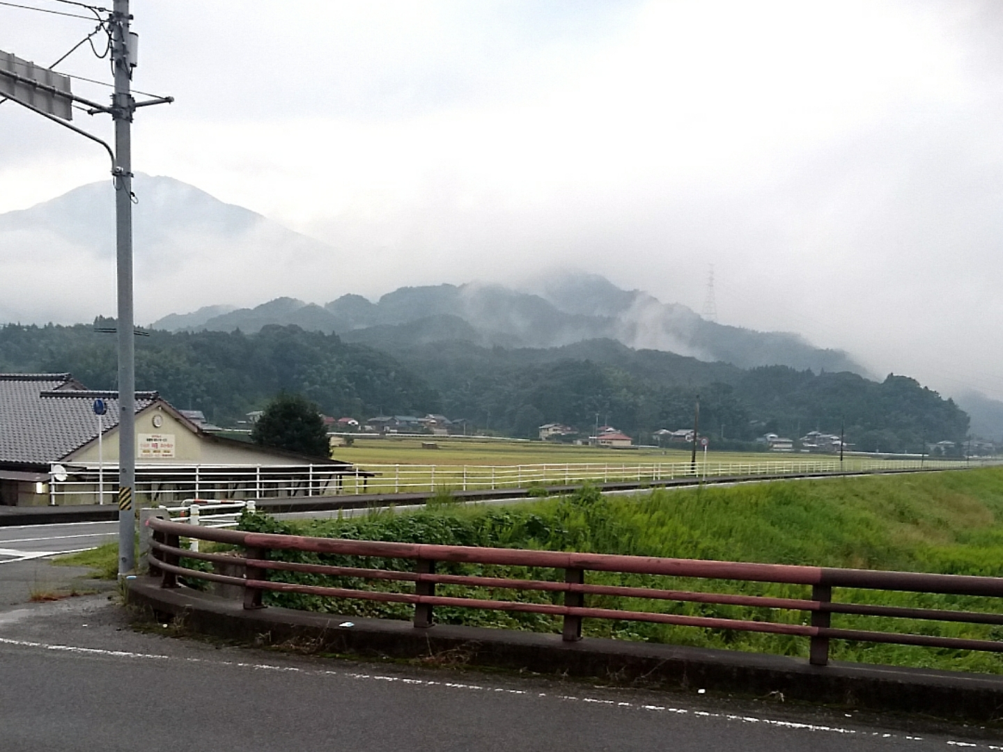 佐賀県唐津市相知町 県道341号線と作礼山